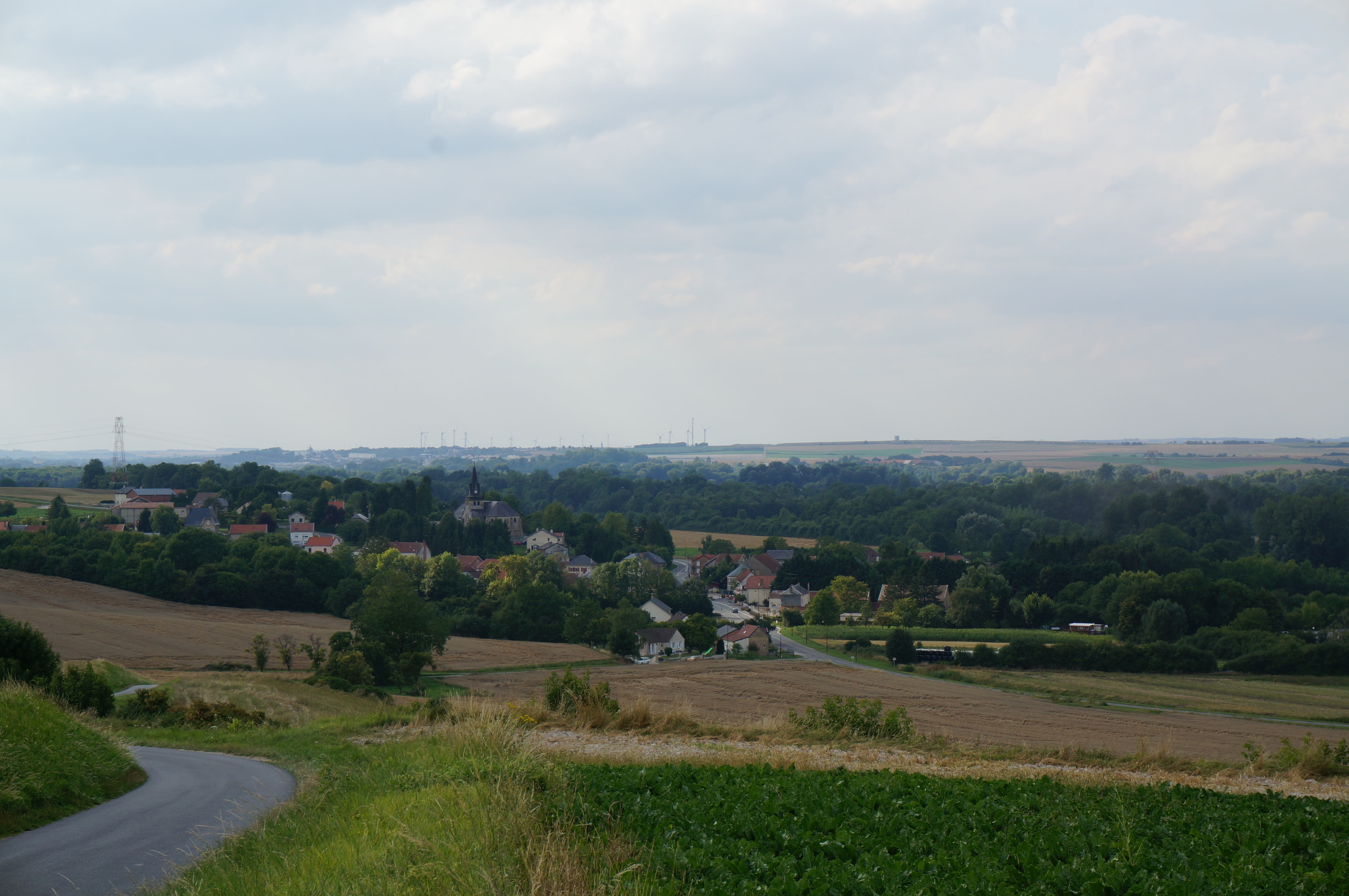 Vue de seuil avec en arrière plan Rethel.